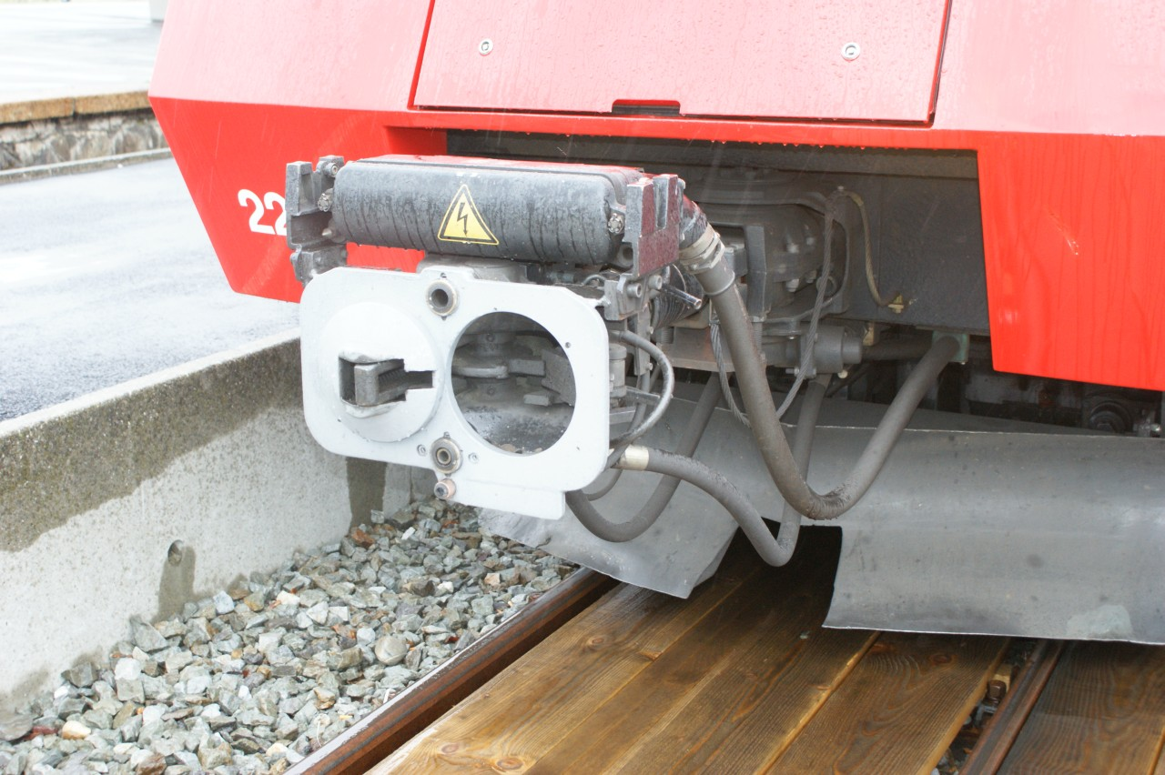 Scharfenbergkupplung am TMR BDeh 4/8 22